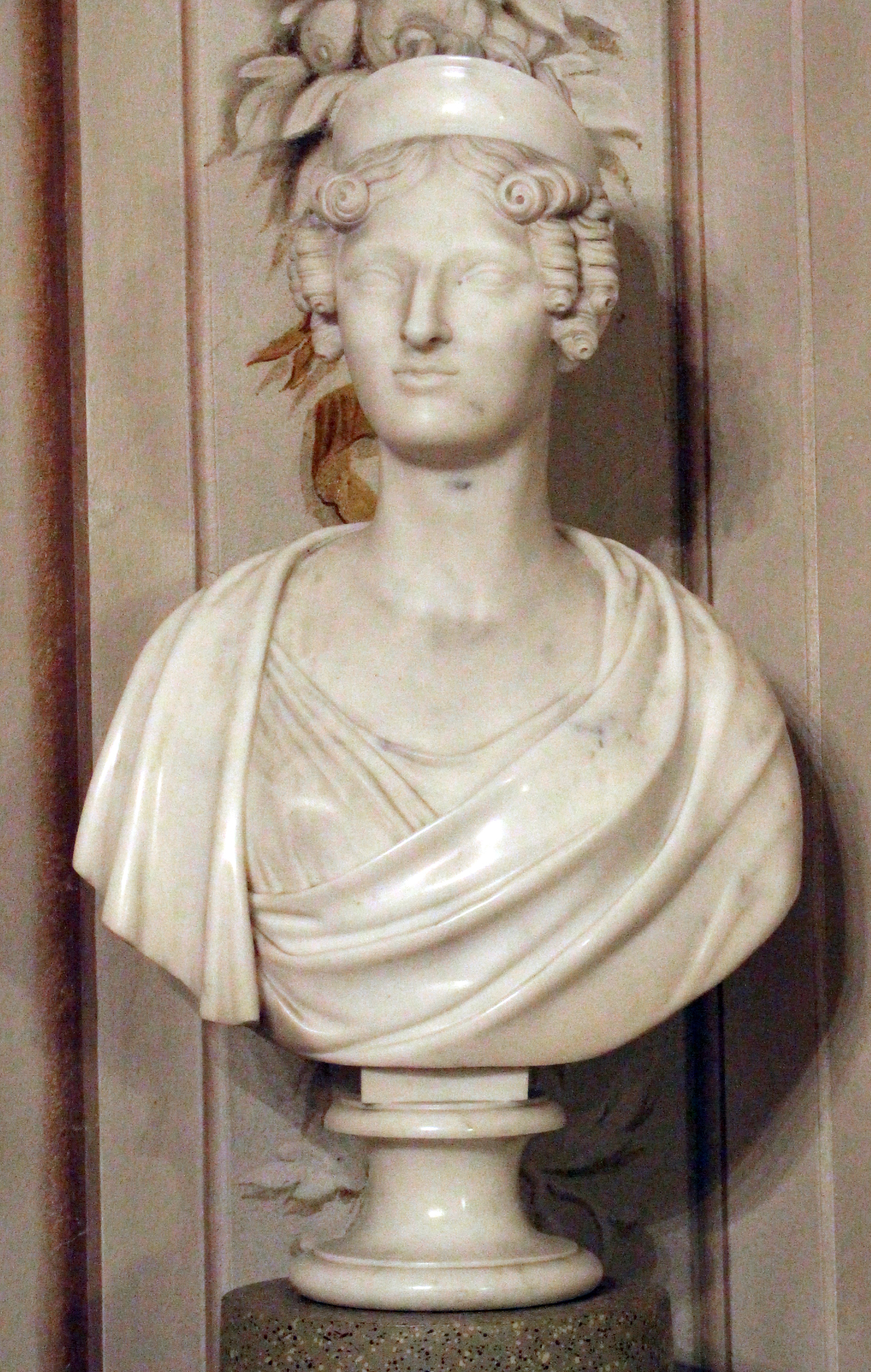 Villa di Poggio Imperiale - Appartamento leopoldino